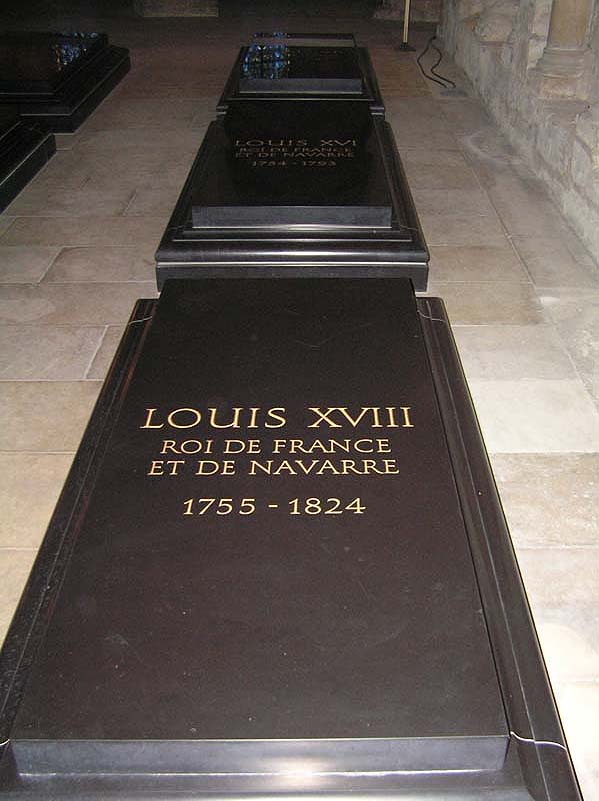 Tombe de Louis XVIII roi de France, Basilique de Saint denis